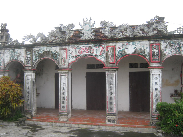 Đền thờ Triệu Quang Phục ở xã Khánh Hải, Yên Khánh, Ninh Bình